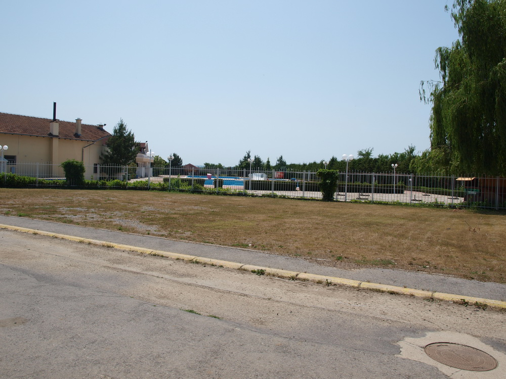 Bazeni u selu Selna, Brodsko-posavska županija.